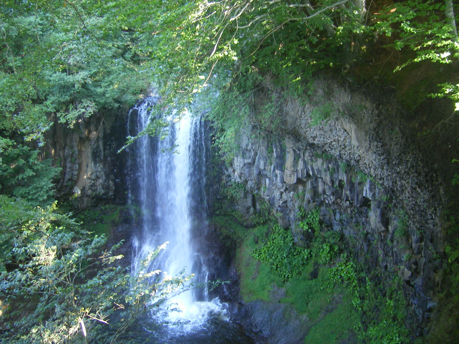 Rhue Waterfalls, Égliseneuve-d'Entraigues